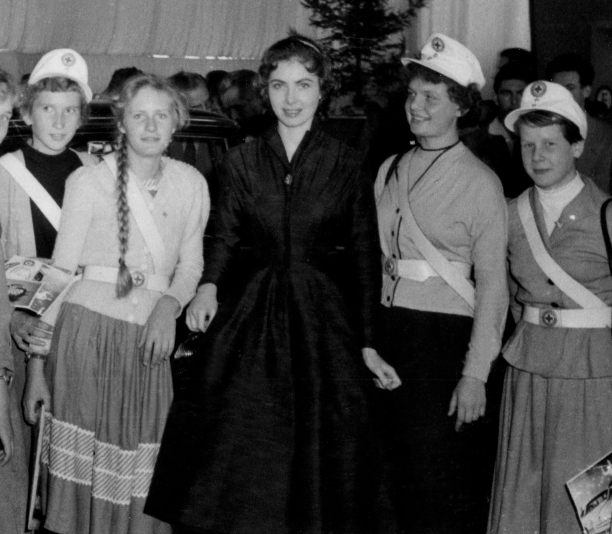 Margit Nünke als frisch gewählte Miss Germany auf der Frankfurter Automobilausstellung 1955, am Stand von Mercedes, umringt von Schülerlotsinnen. Im Herbst 1955 fand in Bad Homburg v. d. H. ein Treffen/Bundeswettbewerb der 60 besten Schülerlotsen und Schülerlotsinnen Deutschlands statt, gesponsert von Ford; auch eine kleine Anzahl ausländischer Schülerlotsen war - außer Wettbewerb - eingeladen, u.a. aus Belgien, Dänemark und den US-Streitkräften in Deutschland. Zum Rahmenprogramm gehörte u.a. ein Besuch der Automobilaussstellung, wo Margit Nünke am Stand von Mercedes Promoting machte. (Der Fotograf nahm teil als der drittbeste Schülerlotse aus Berlin.)